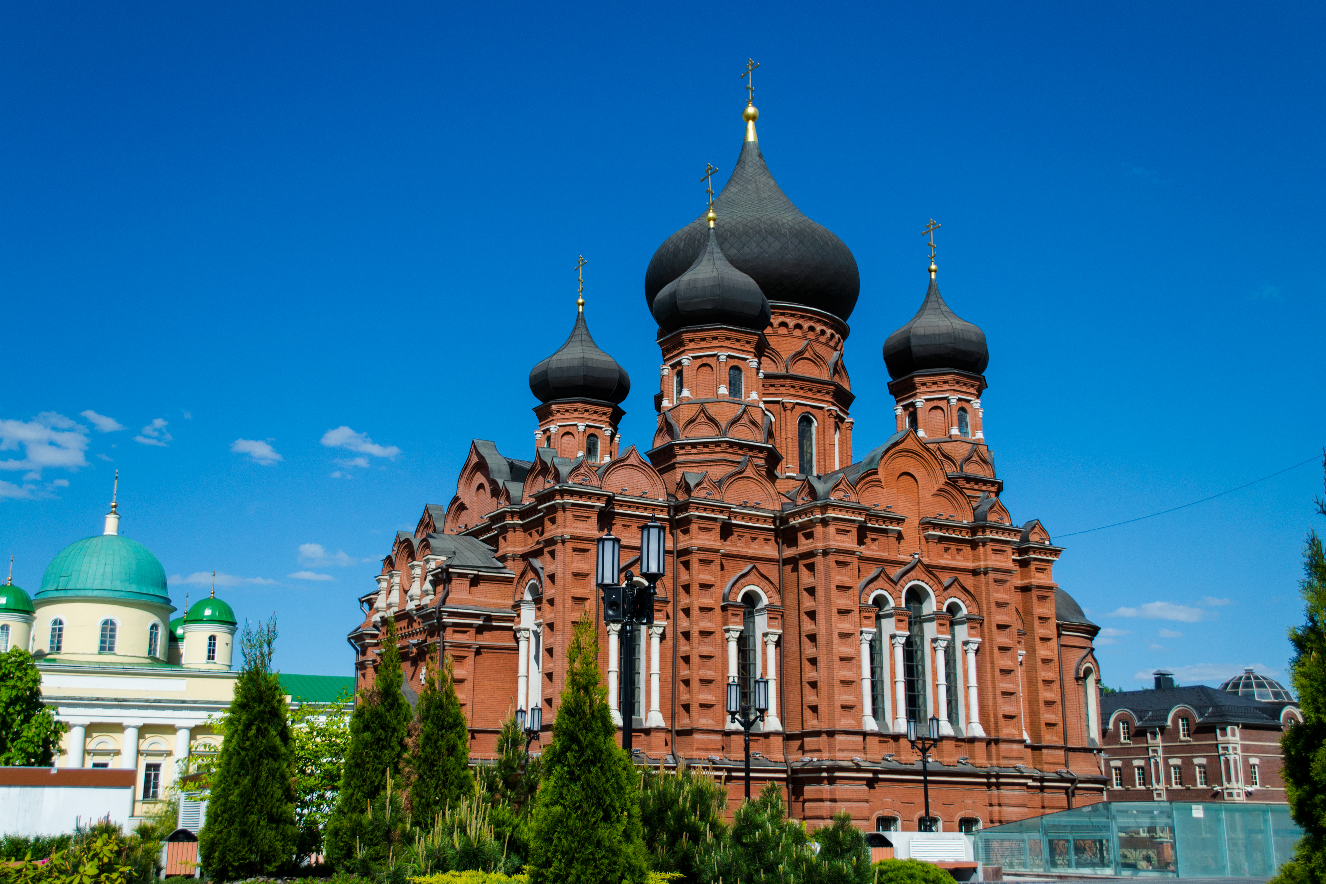 Успенский монастырь: улица Менделеевская, Тургеневская, Тула, Тульская область